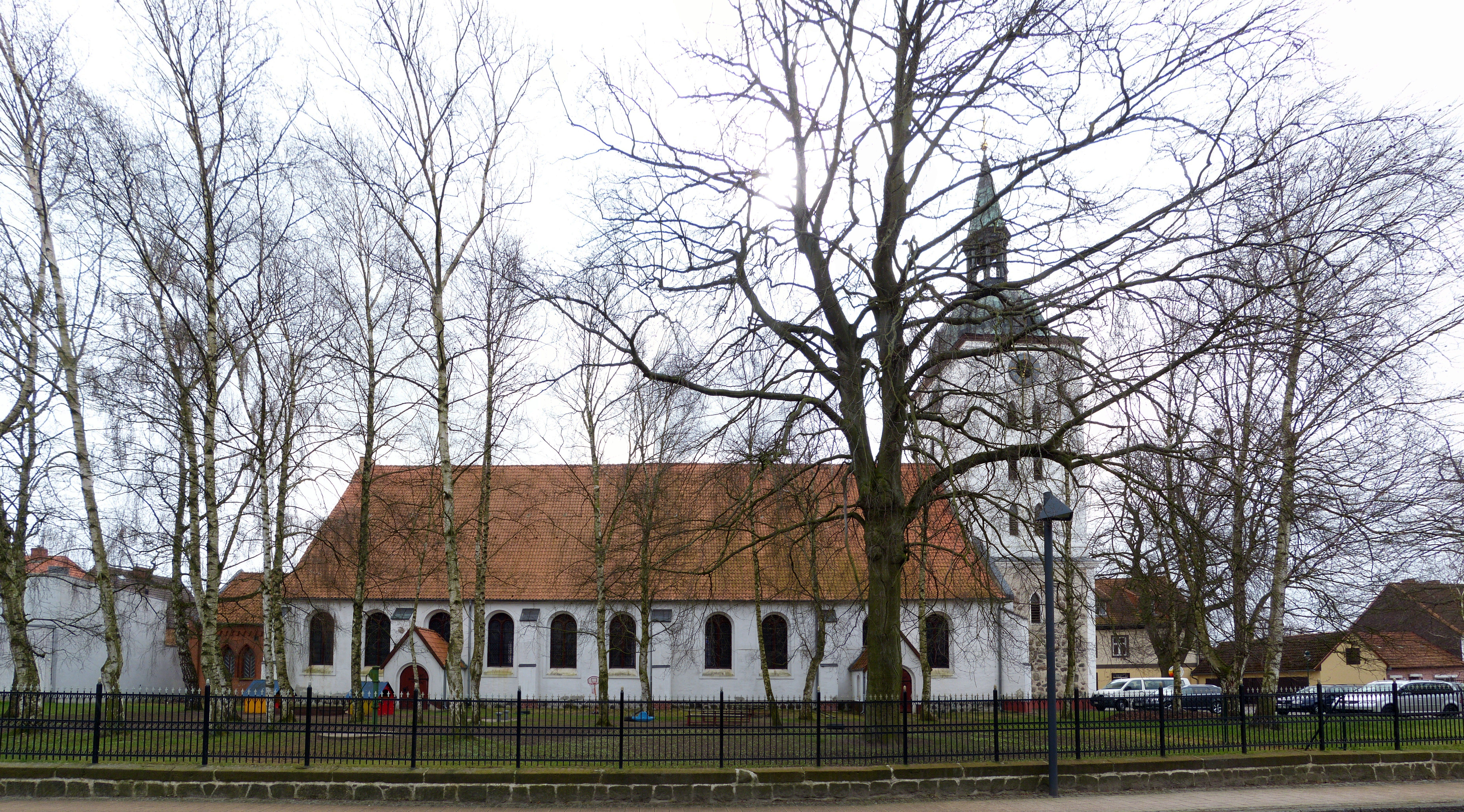 Loitz, St.Marien-Kirche, Nordseite